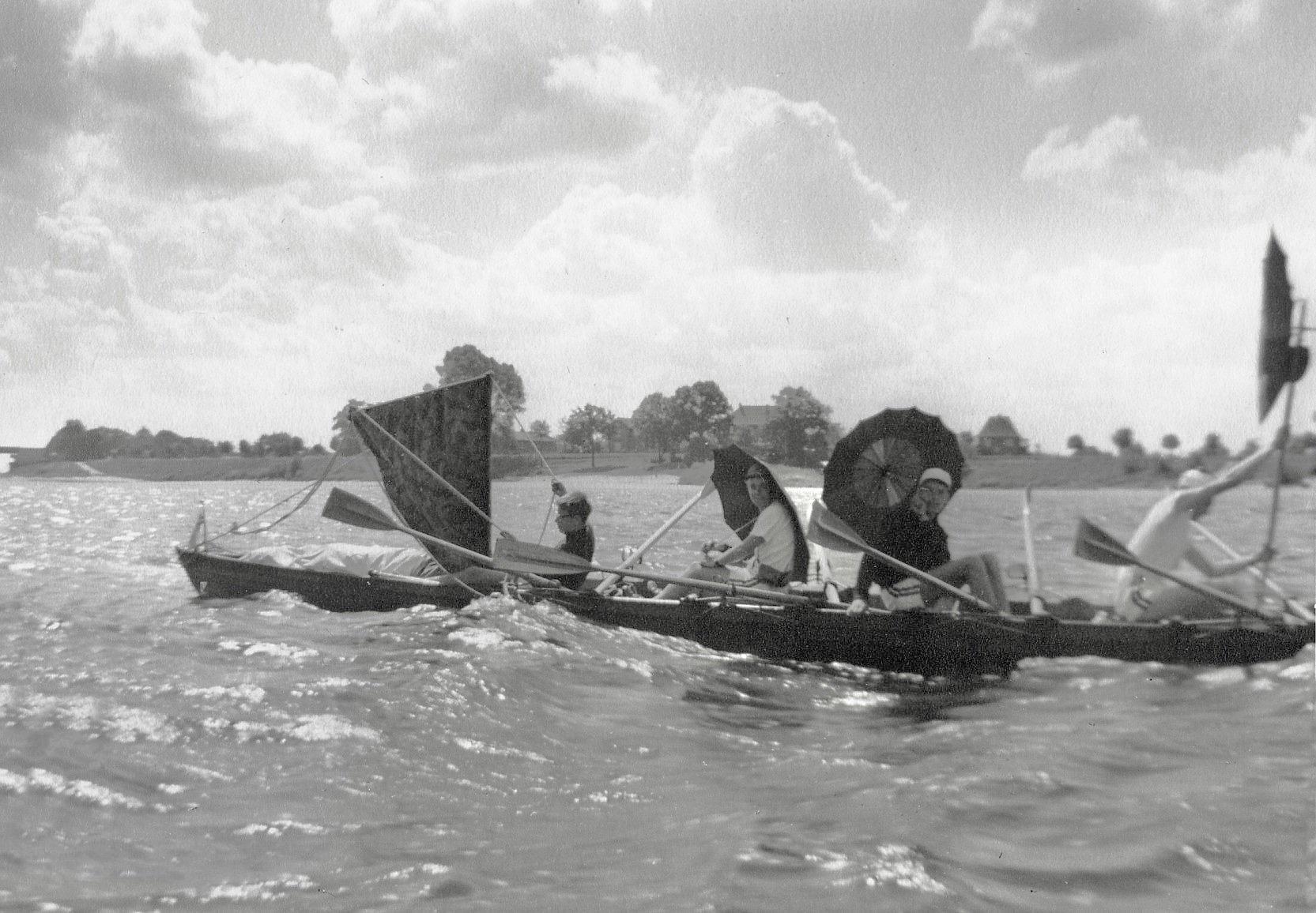 Wanderrudern auf der Elbe 1959, erster Preis im schulinternen Fotowettbewerb des Matthias-Claudius-Gymnasiums. Aufgenommen mit einer "Balder Boy Box", daher die Randunschärfe rechts.